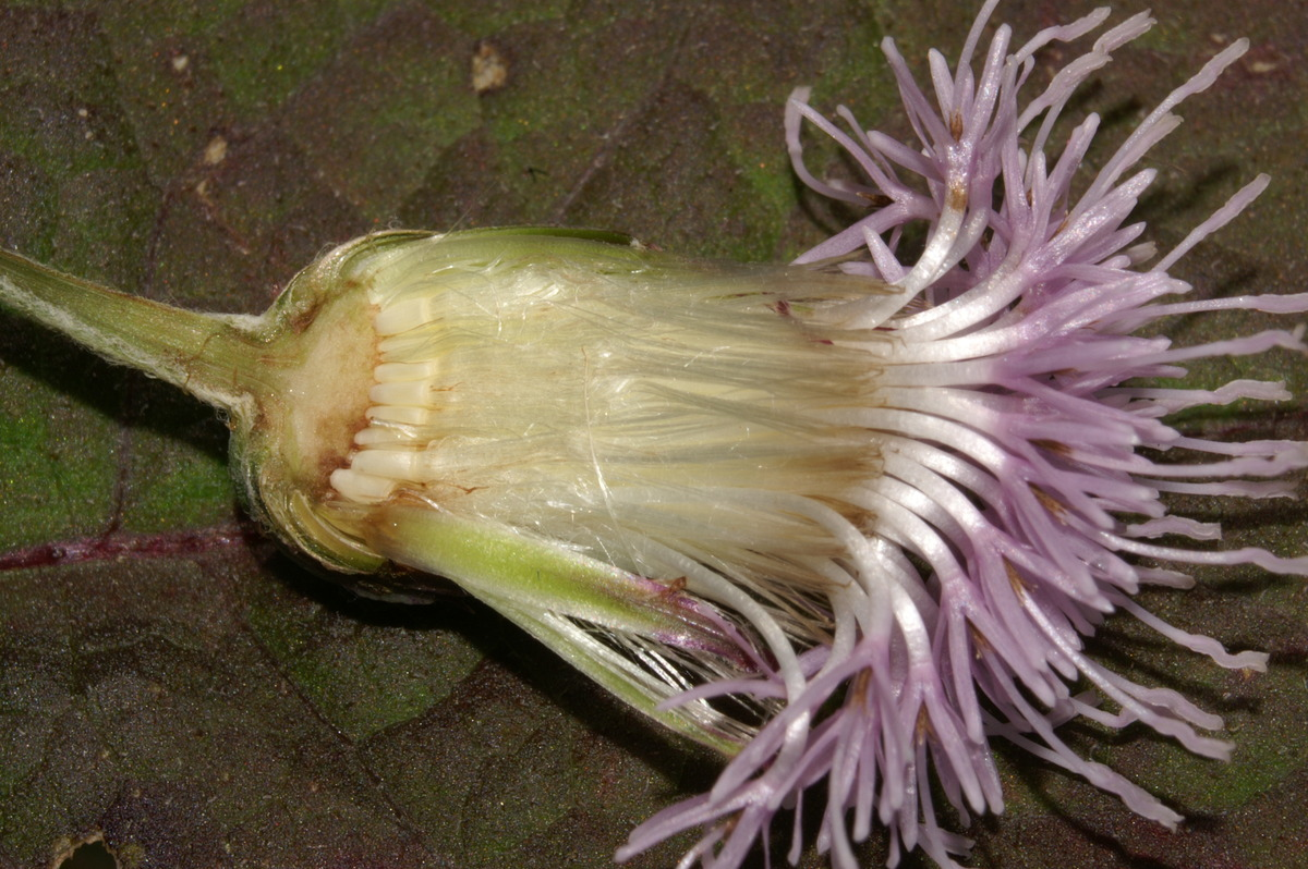 Njivski osat na ljubljanskem barju.